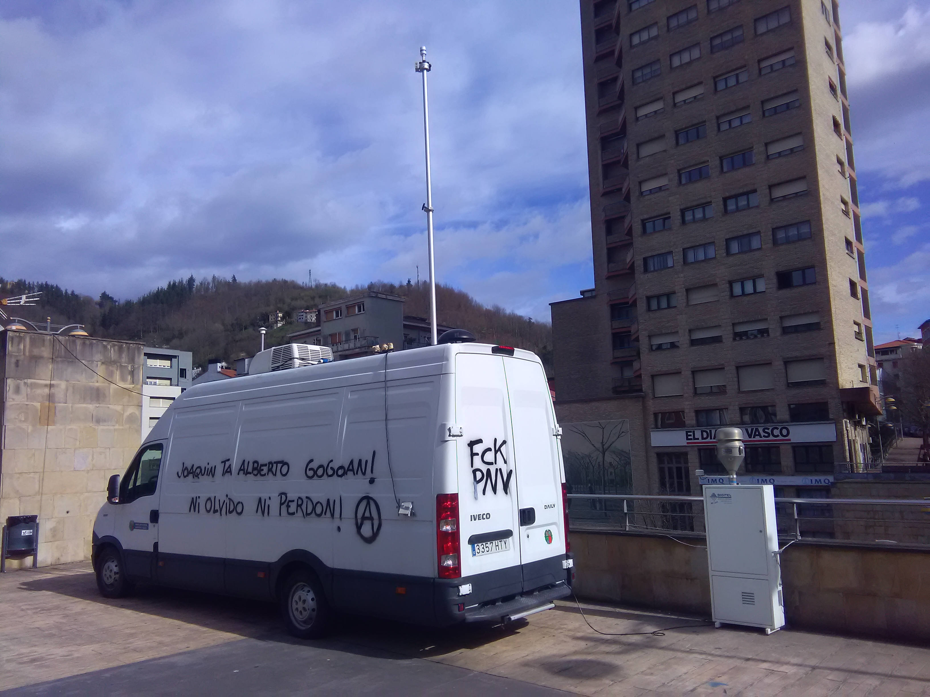 Zaldibarko zabortegiaren hondamendiarengaitiko aire neurgailua, Eibarko Untzaga Plazan. Ondoan, Eusko Jaurlaritzako ibilgailua protesta grafitiekin.